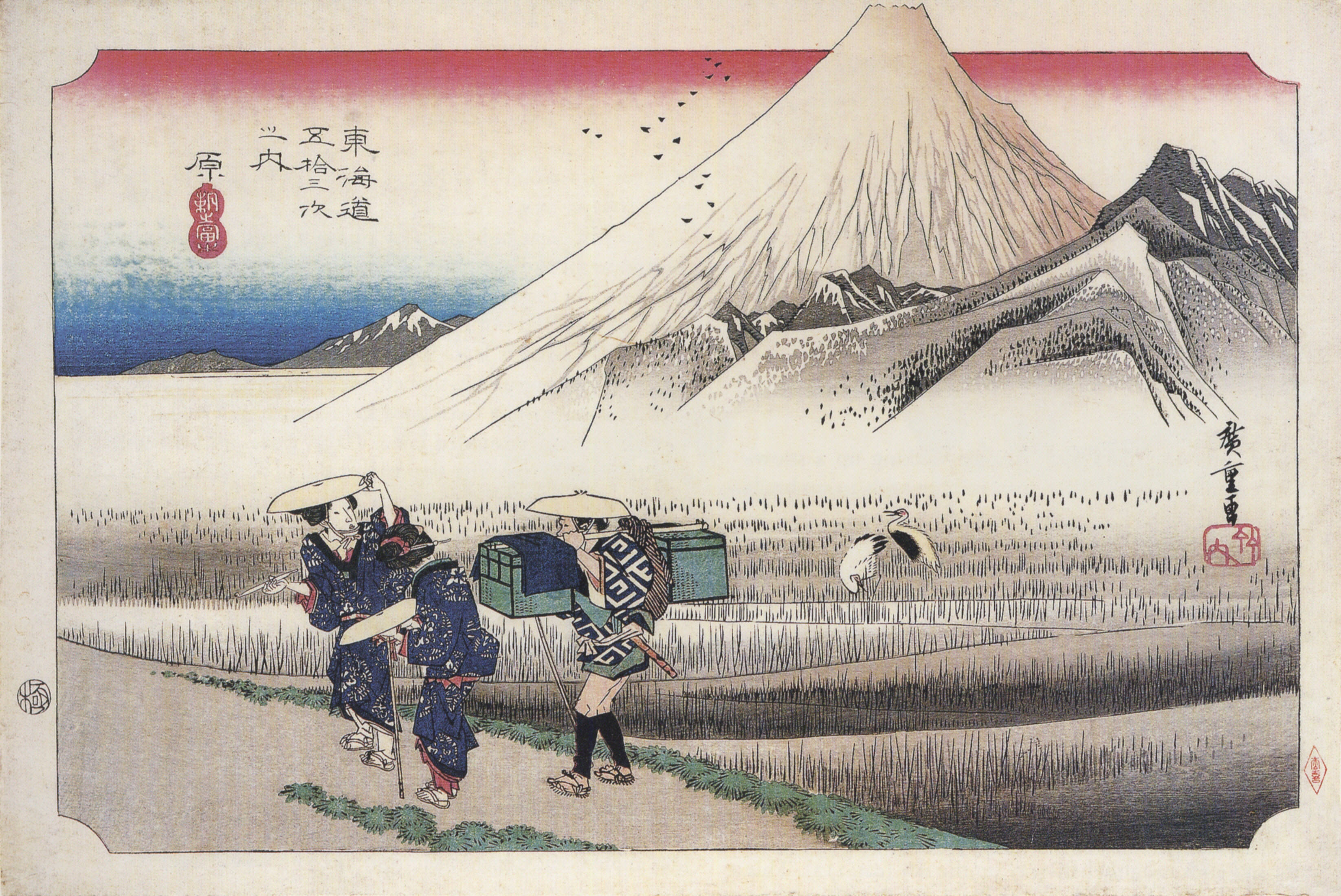 "Tokaido-53tugi Hara",ukiyo-e by Hiroshige Utagawa.